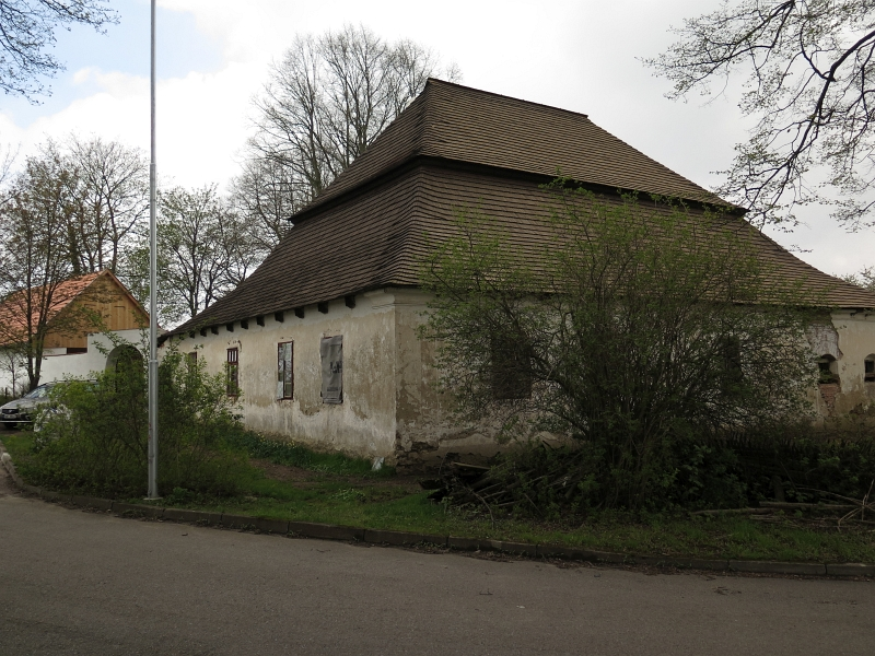 Fara, Křeč 5, Křeč (okres Pelhřimov).